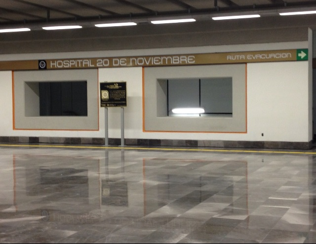 Vestíbulo de la Estación 20 de Noviembre